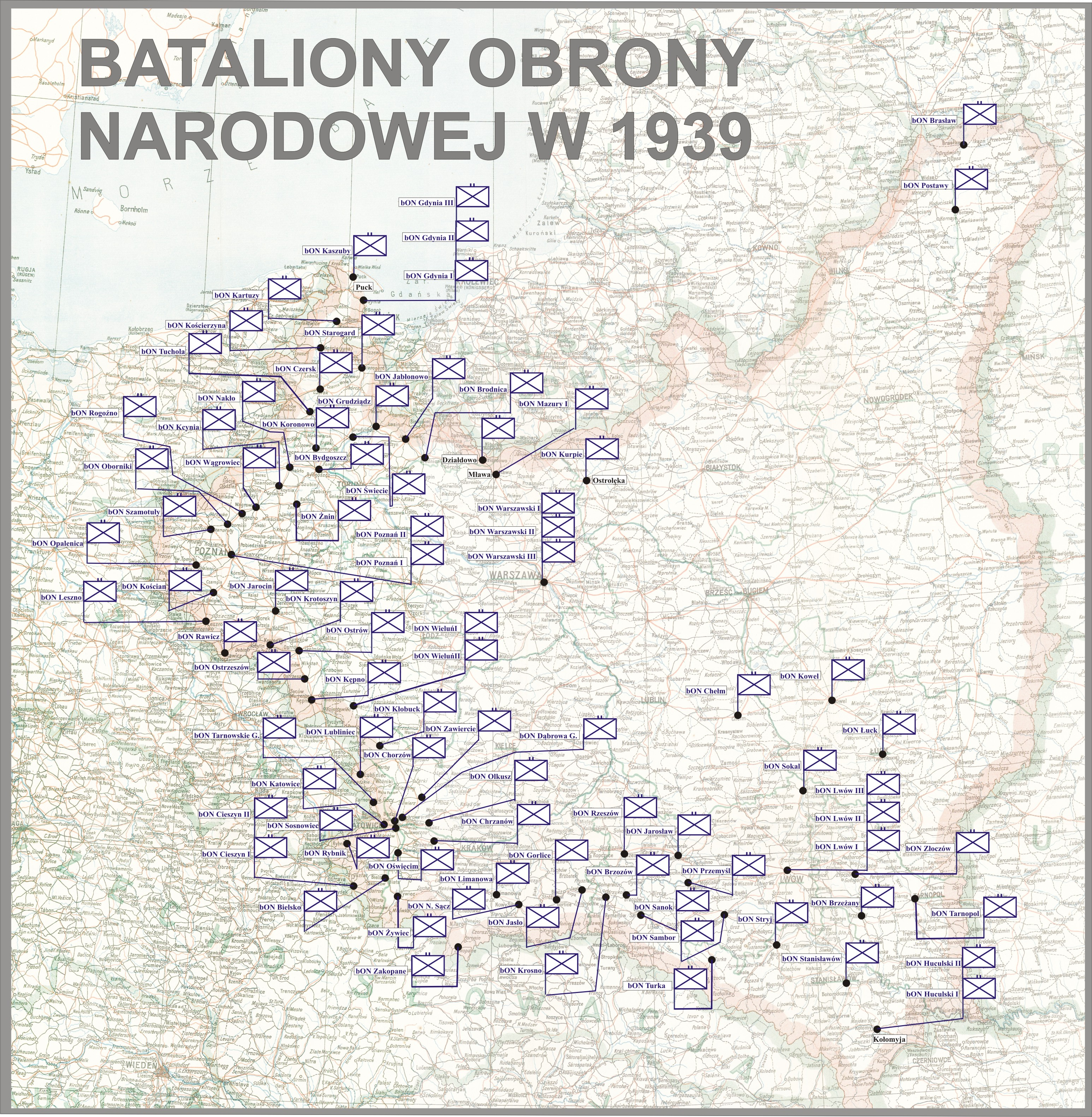 Obrona Narodowa w 1939